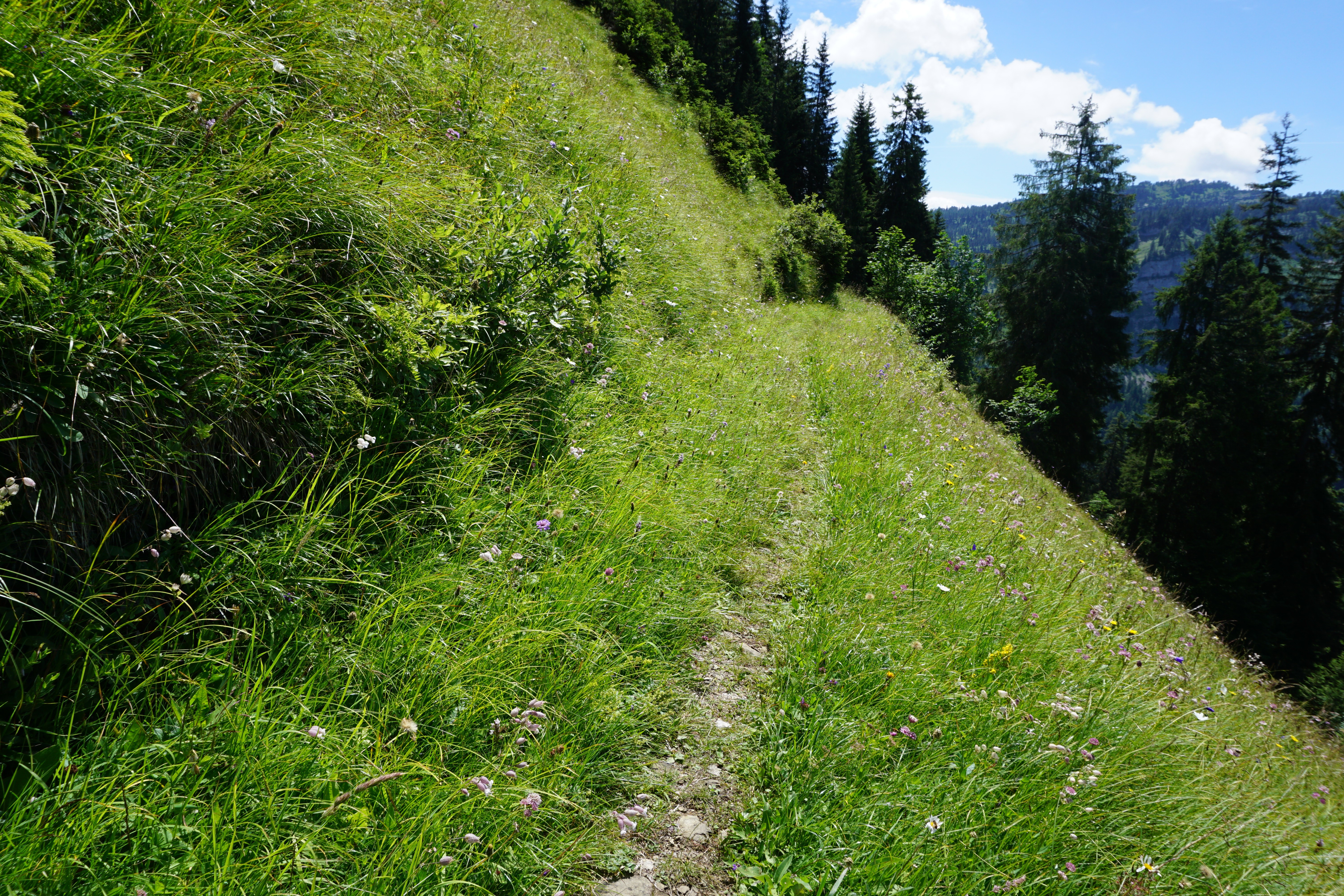 Ein Teil des alten Saumpfades, der über den Grünenbergpass führt. Heute ist dies ein Wanderweg der Schwierigkeitsstufe T2 nach der SAC-Wanderskala.